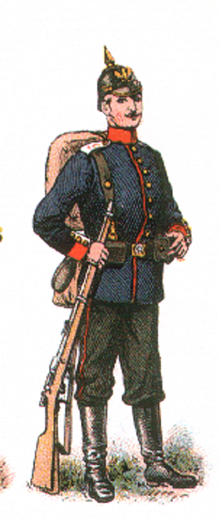 Infanterist des kgl. preußischen IX. Armeekorps in Felduniform vor 1910